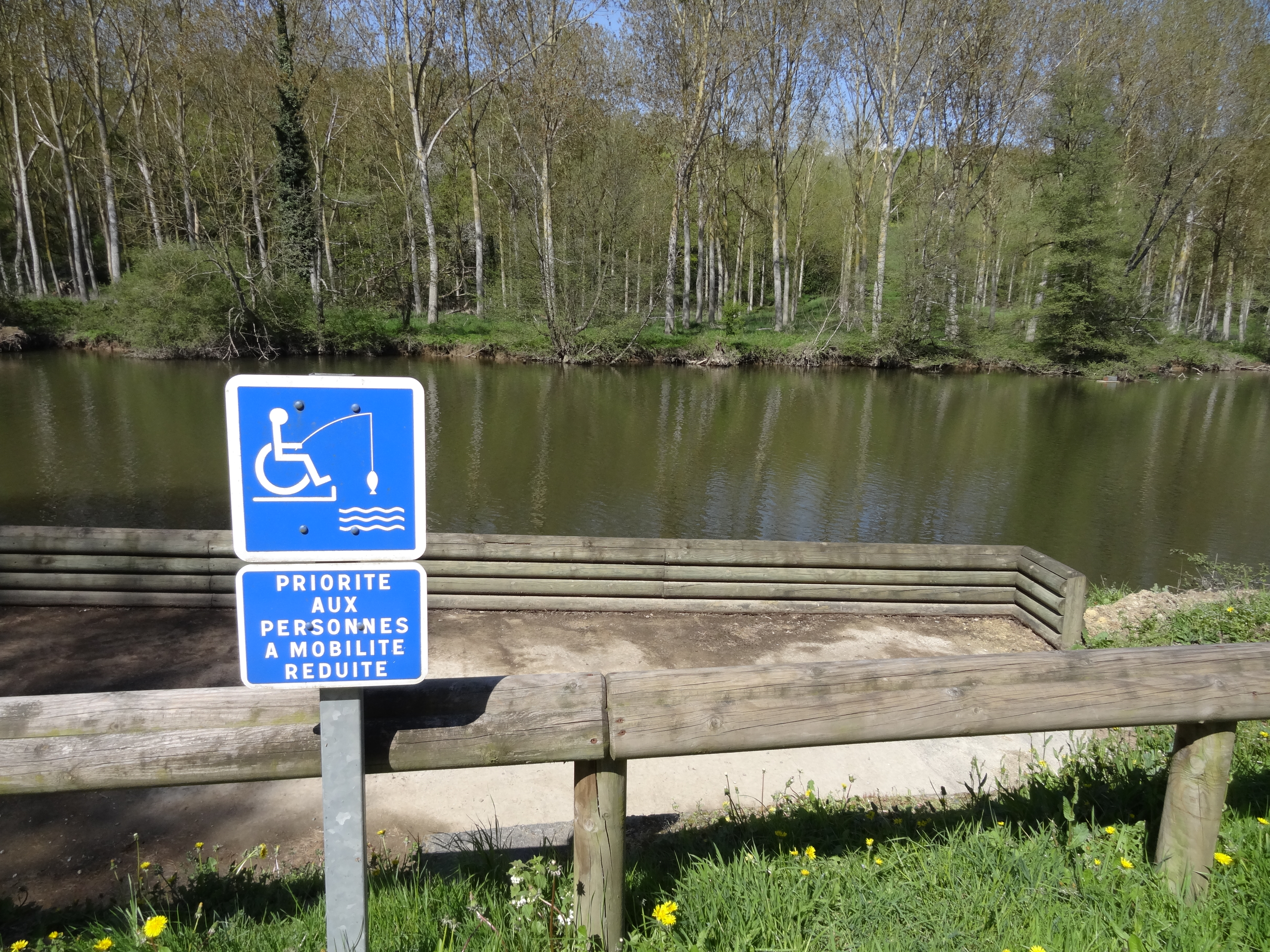 Emplacement prioritairement réservé aux personnes à mobilité réduite pour la pratique de la pêche au bord de la rivière Mayenne (Mayenne, France)